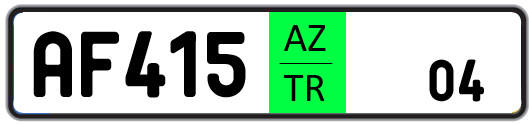 Azərbaycan Respublikası avtomobil dövlət qeydiyyat nişanı - Tranzit nömrələr